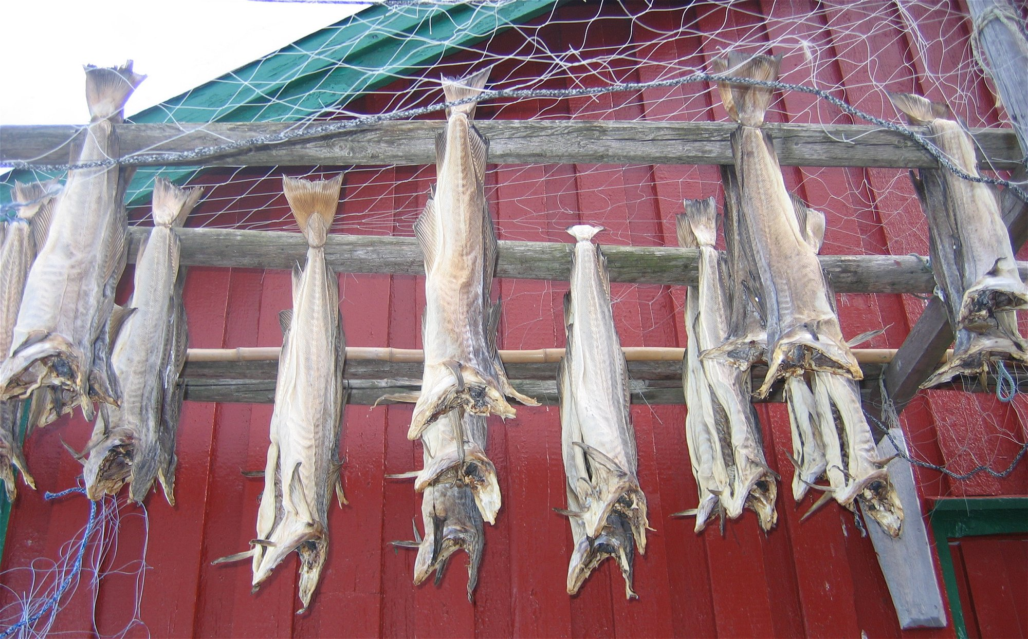 Stockfisch, fotografiert in Stamsund, Norwegen